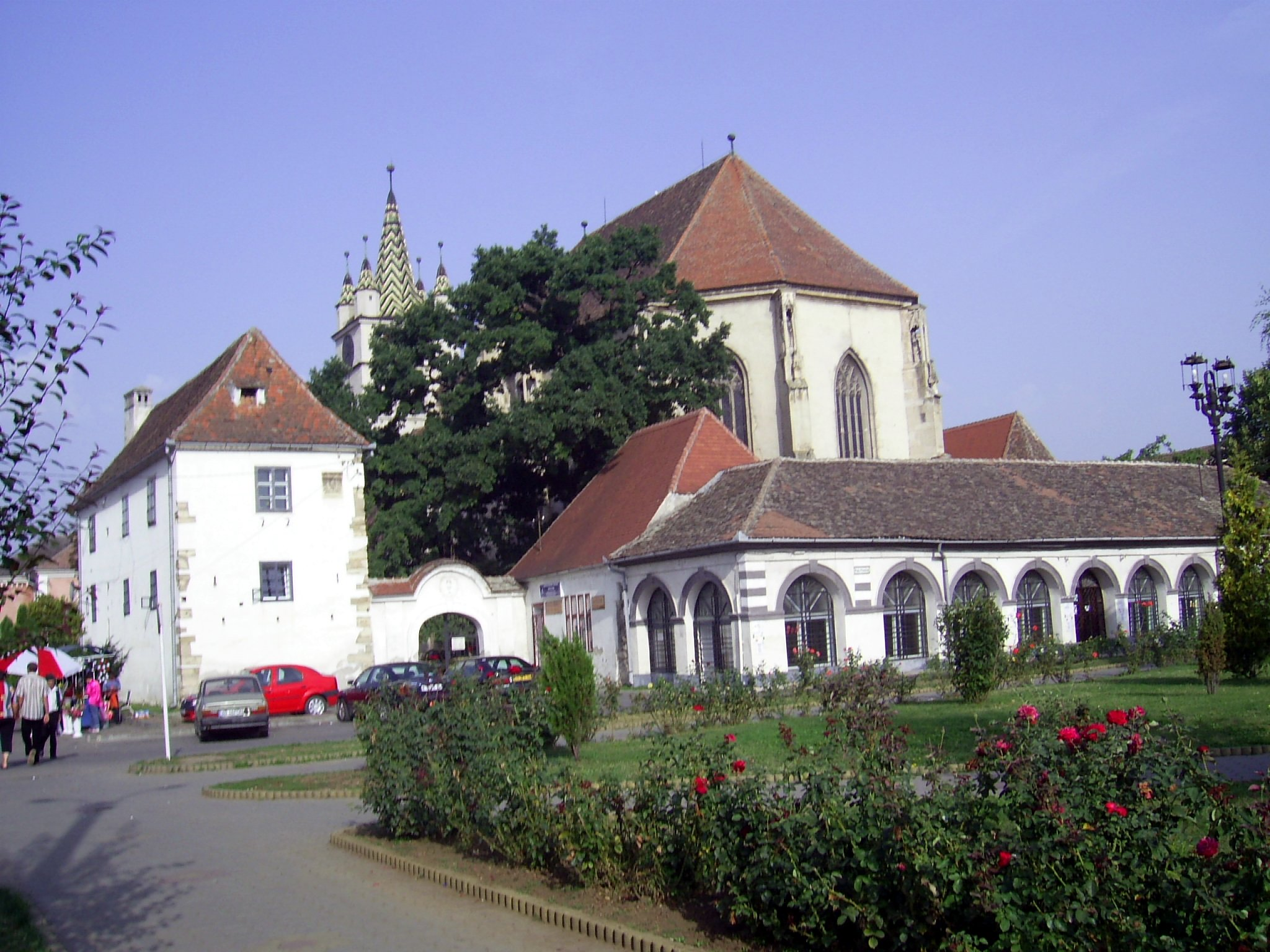 Kirche mit Markthallen 04